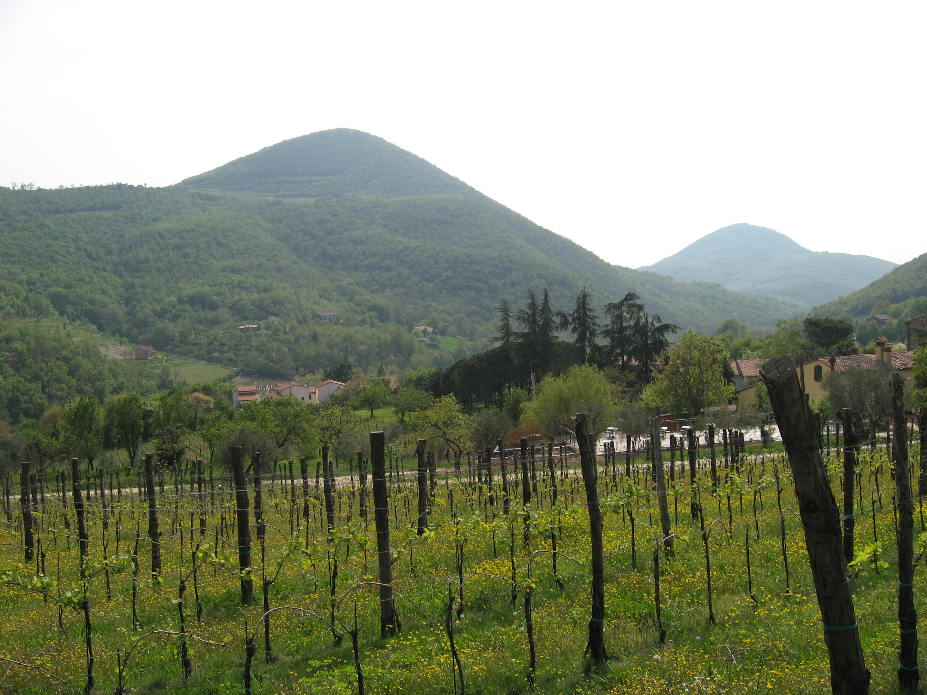 Veduta del Monte Rusta dalla valle di Faedo.